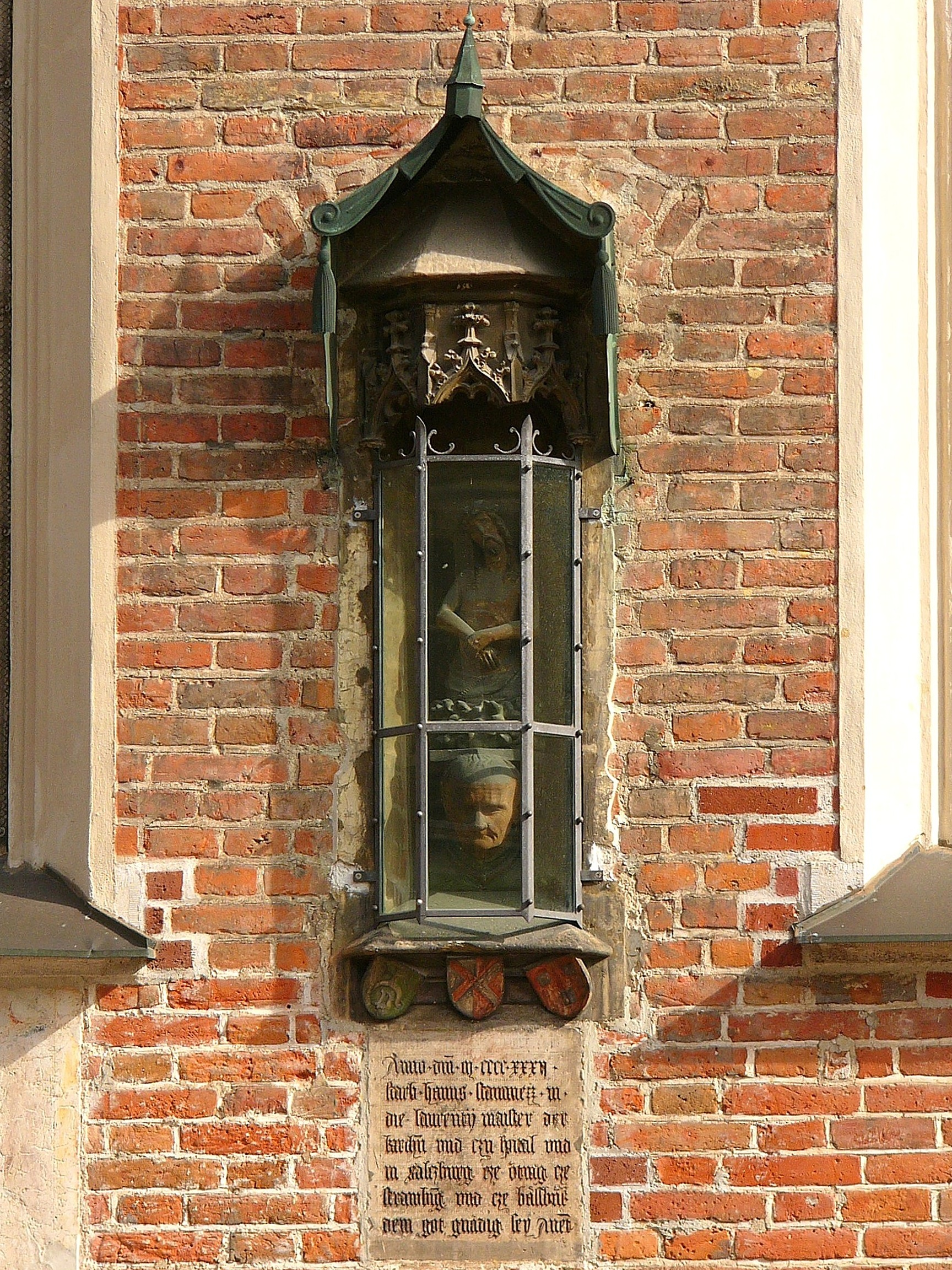 Das Epitaph des Baumeisters Hans von Burghausen